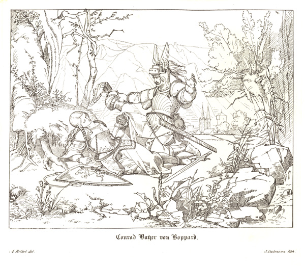 Ritter Conrad Bayer von Boppard trauert der Sage nach um die von ihm in Unwissen getötete Maria. Danach gründet er das Kloster Marienberg von Boppard.